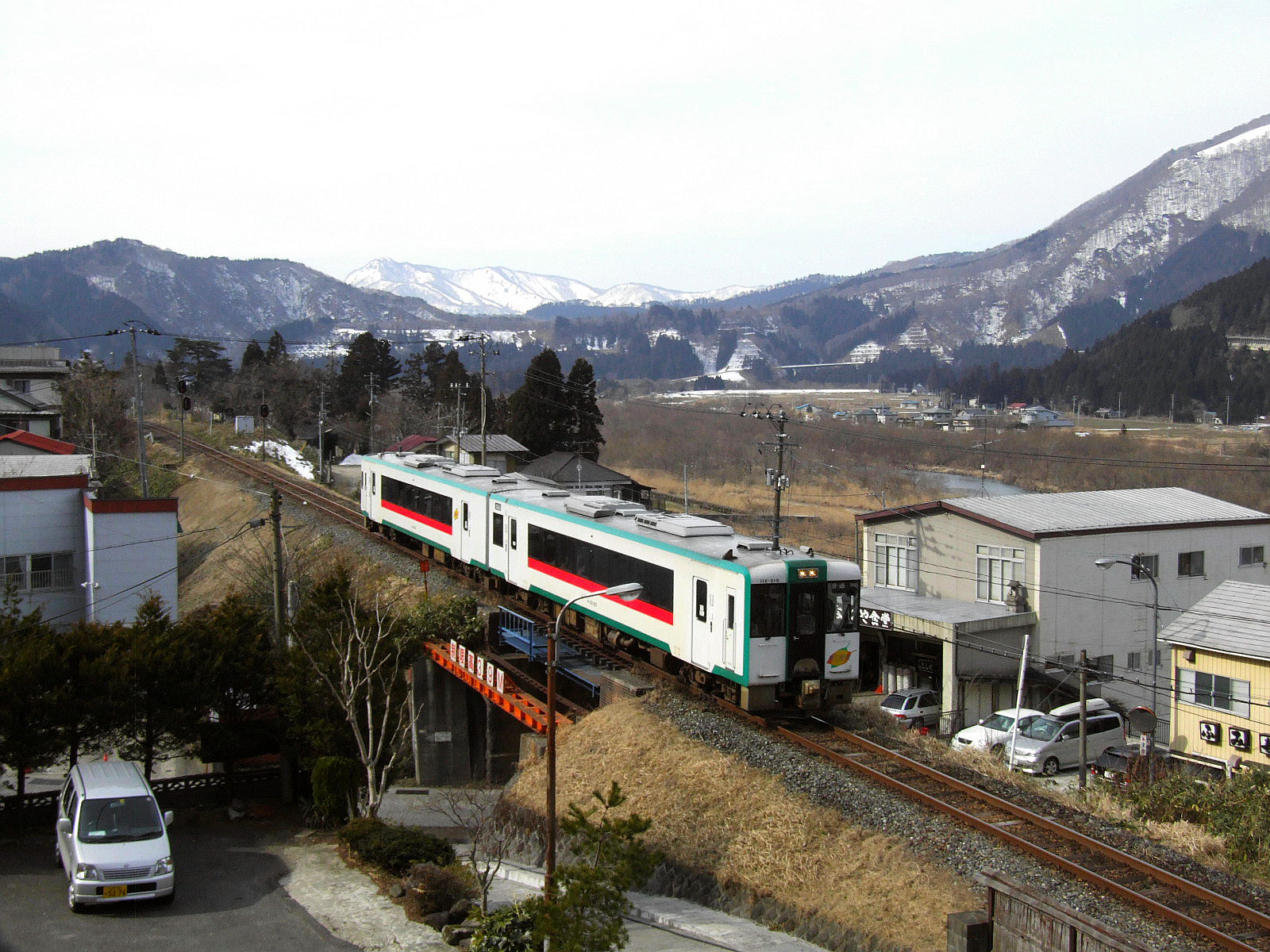 East Rukuu Line. Osaki, Miyagi prefecture, Japan.